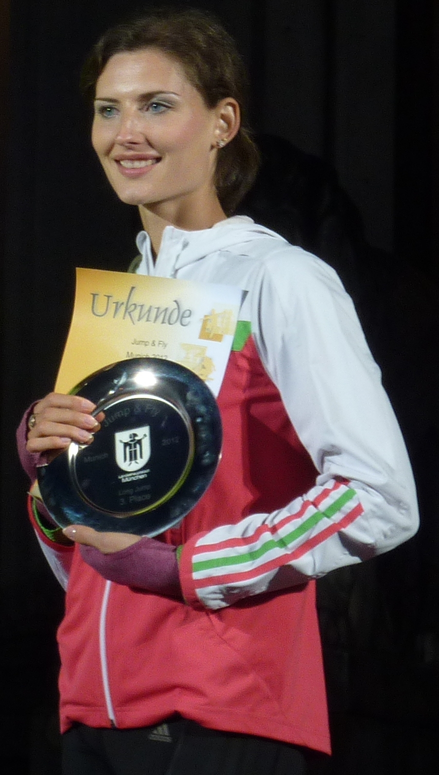 Julija Witaljewna Pidluschnaja beim Jump & Fly 2012 München